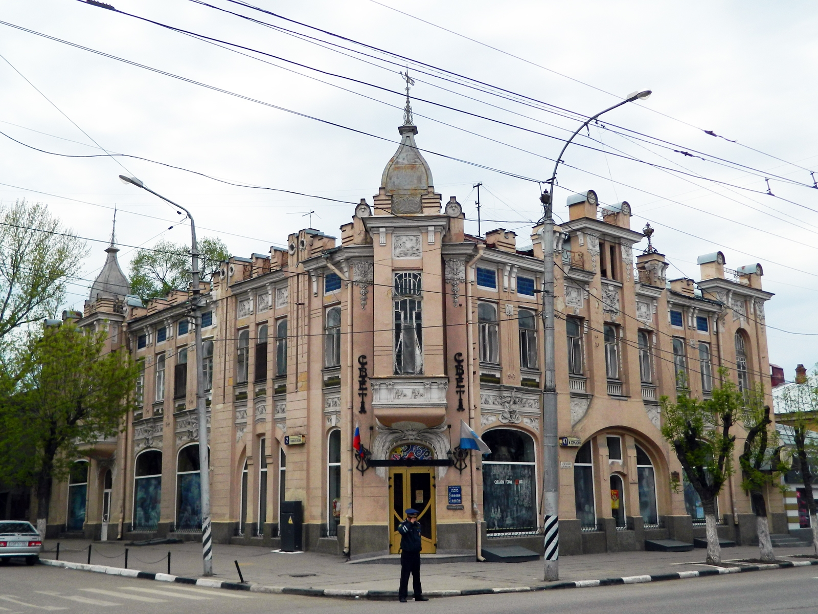 Дом Сатова (Саратов)